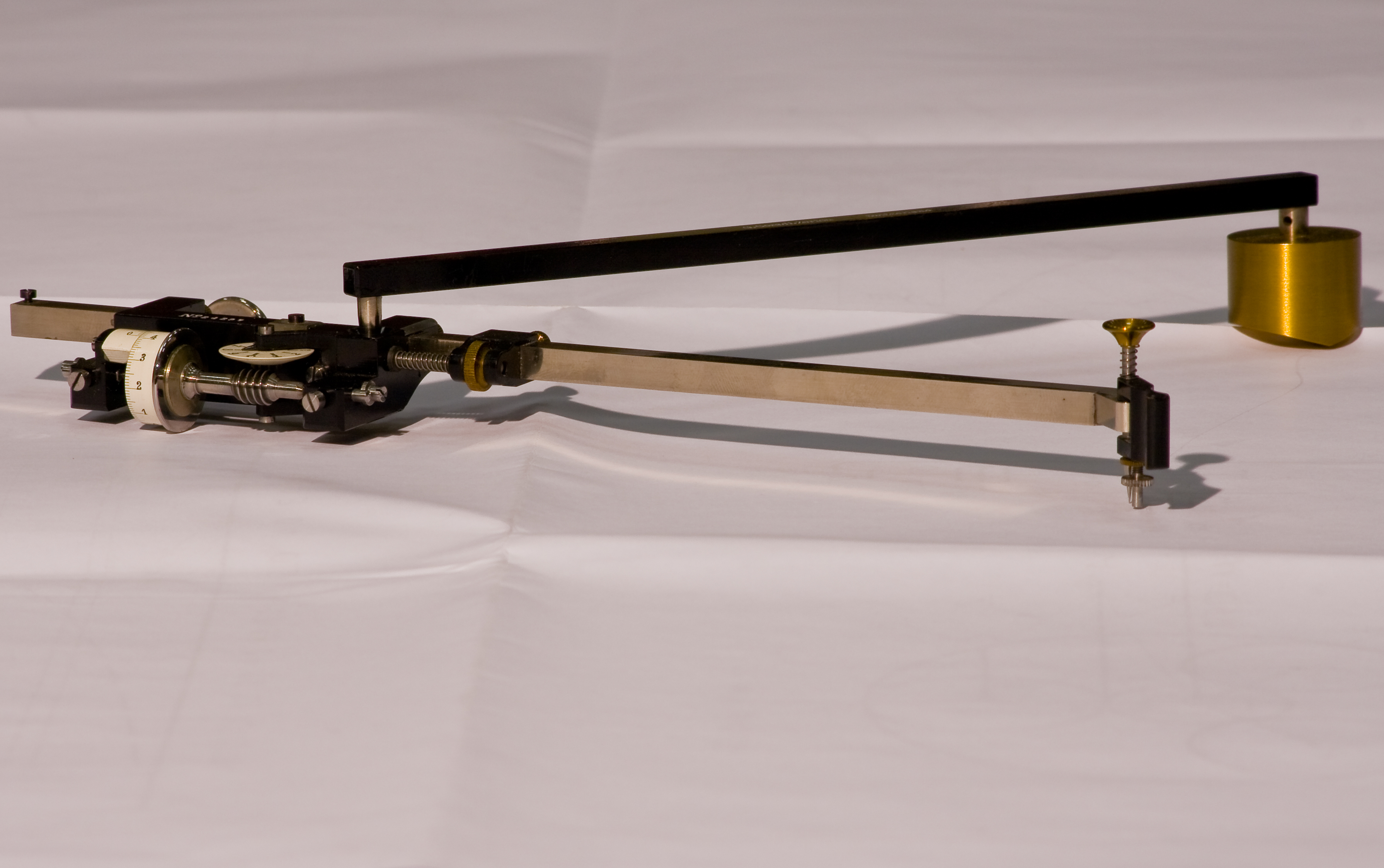 Планиметр Амслера-Коради: собранный прибор